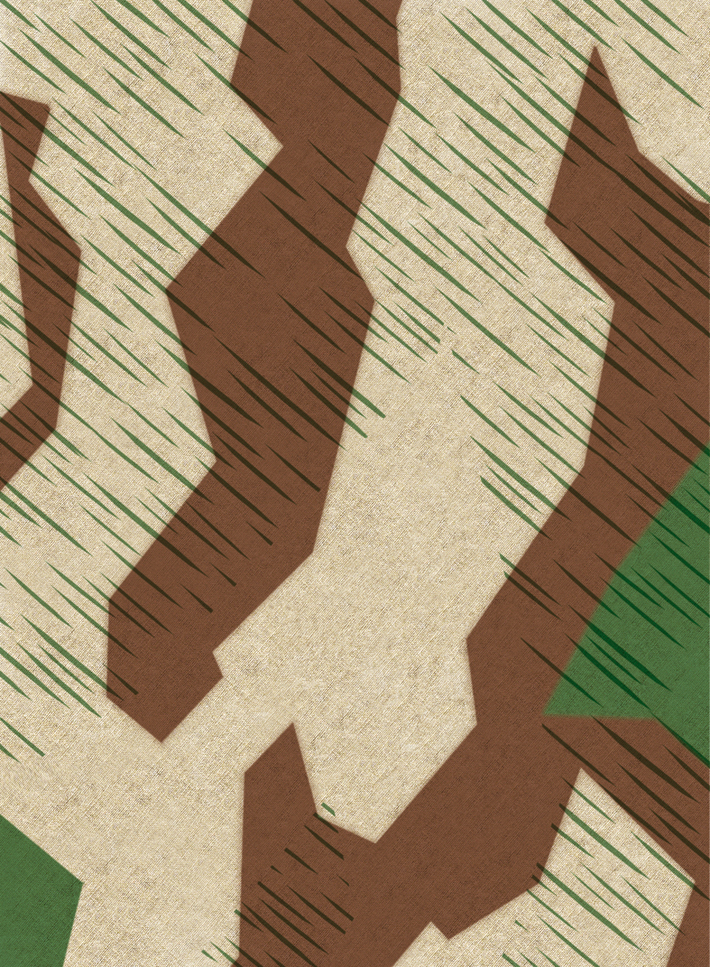 Buntfarbendruck der Reichswehr, 1931 für den Bedruck der Zeltbahn eingeführt.